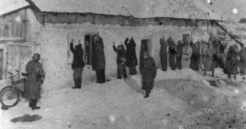 Egzekucja Polaków przez Niemców podczas II wojny światowej w Wawrze.